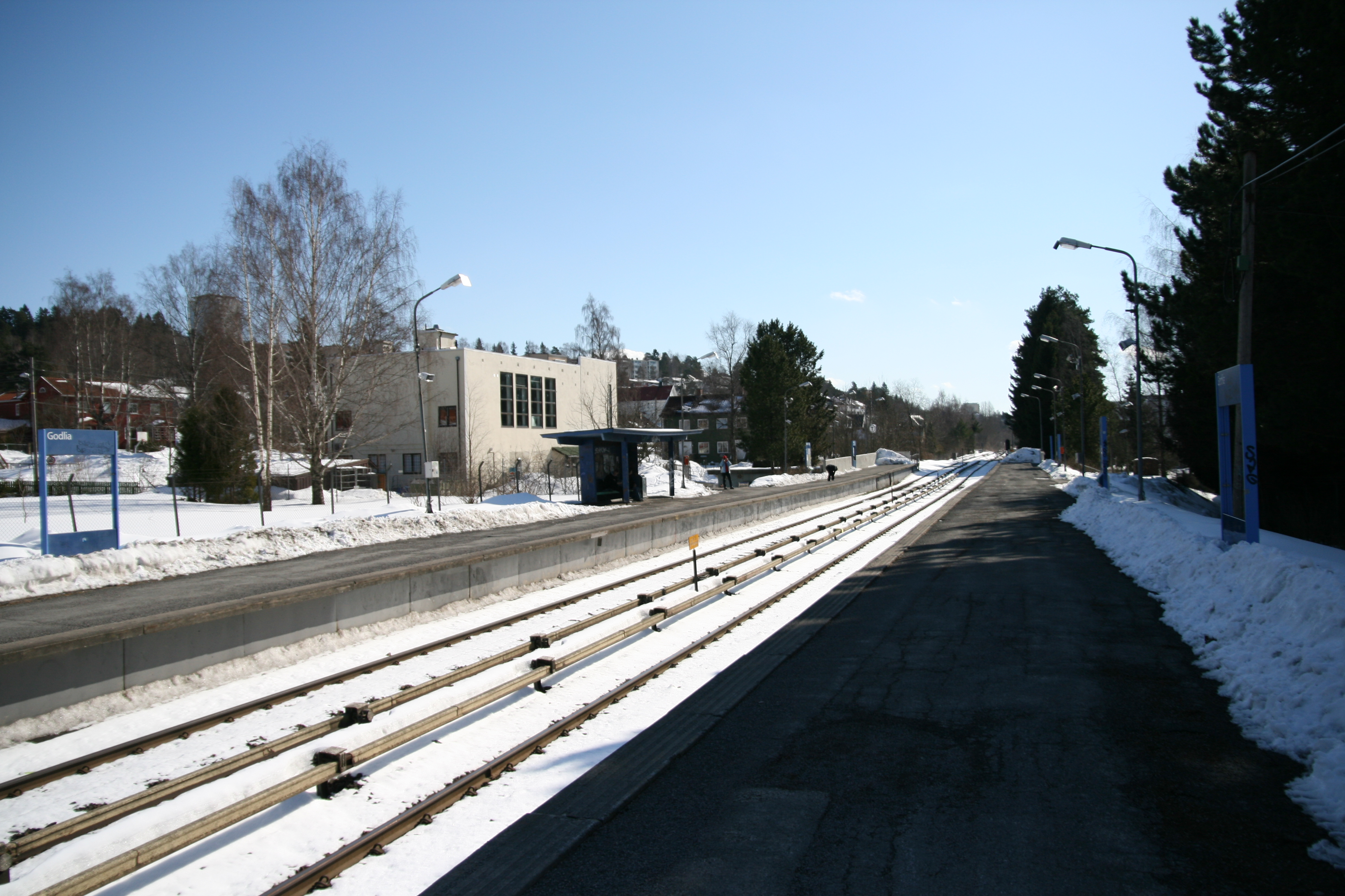 Godlia stasjon på Østensjøbanen. I midten i bakgrunnen sees Golia Velhus.